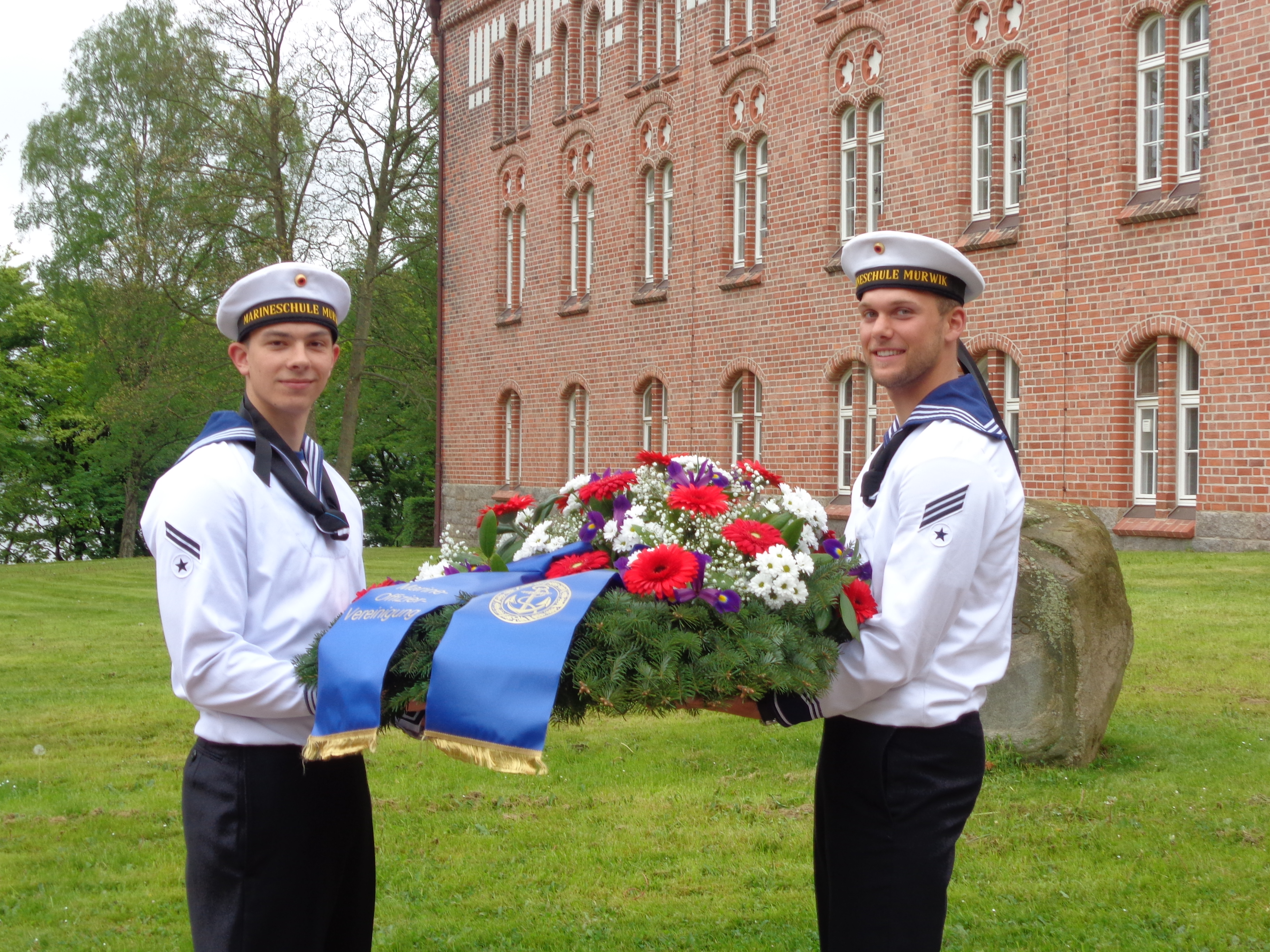 Fotografie eines Obergefreiten (OA) und eines Hauptgefreiten (OA) vor der Kranzniederlegung der Marine-Offizier-Vereinigung am Gedenkstein für die im Zweiten Weltkrieg gefallenen Marinesoldaten in der Marineschule Mürwik, Flensburg.